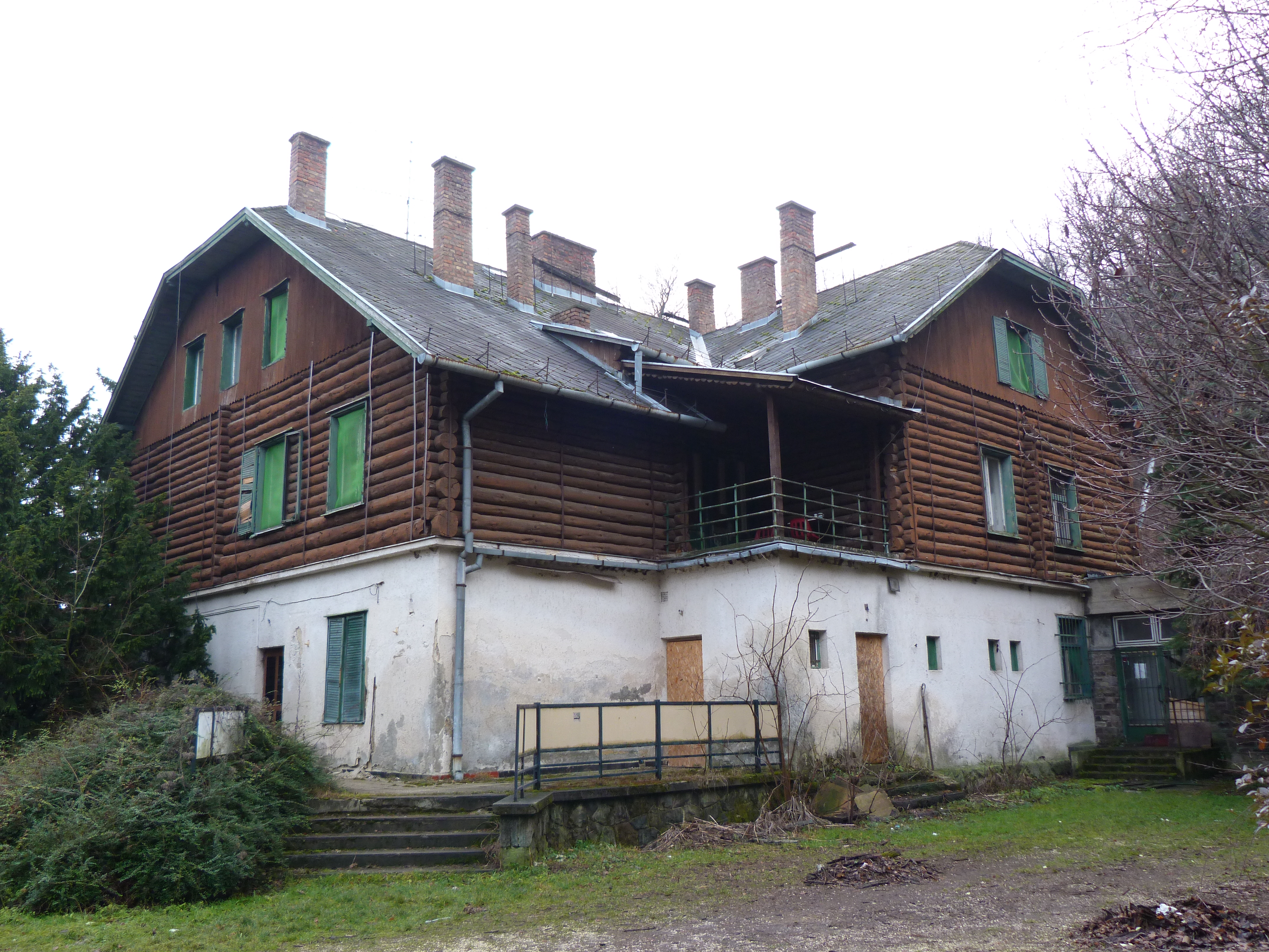 A felvétel 2014. január 5 -én vasárnap készült Szentendrén (Izbég). A Lajos-forrás (1). Turistaház (2,3), Emléktábla a Túristaház falán (4), Kilátás a Túristaháztól (5). Megjelent Creative Commons alatt a Metapolisz DVD sorozatban.